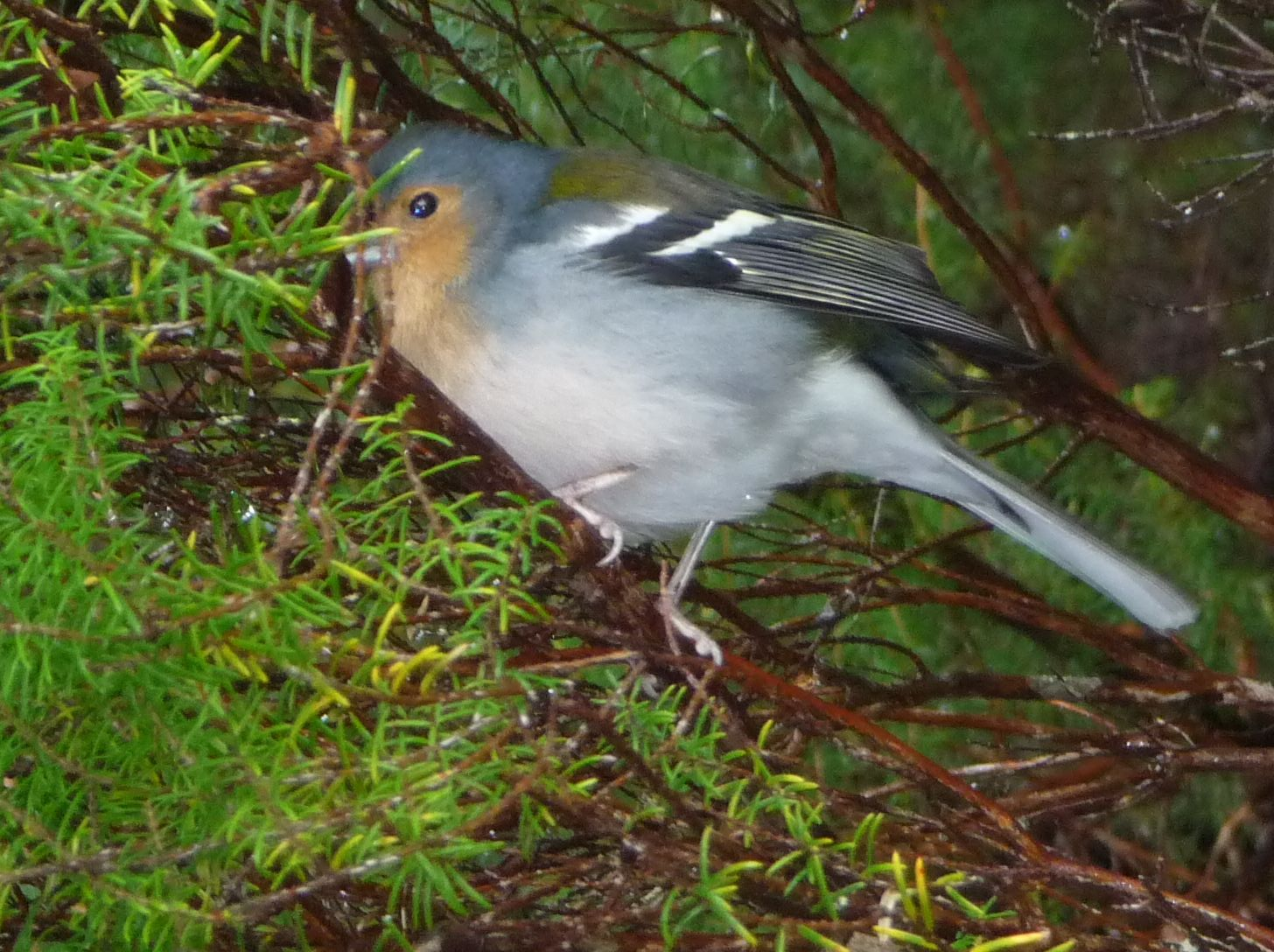 Madeira-pinty hím cserjés hangán (Erica arborea) (Madeira, a Paúl da Serra fennsíkon)